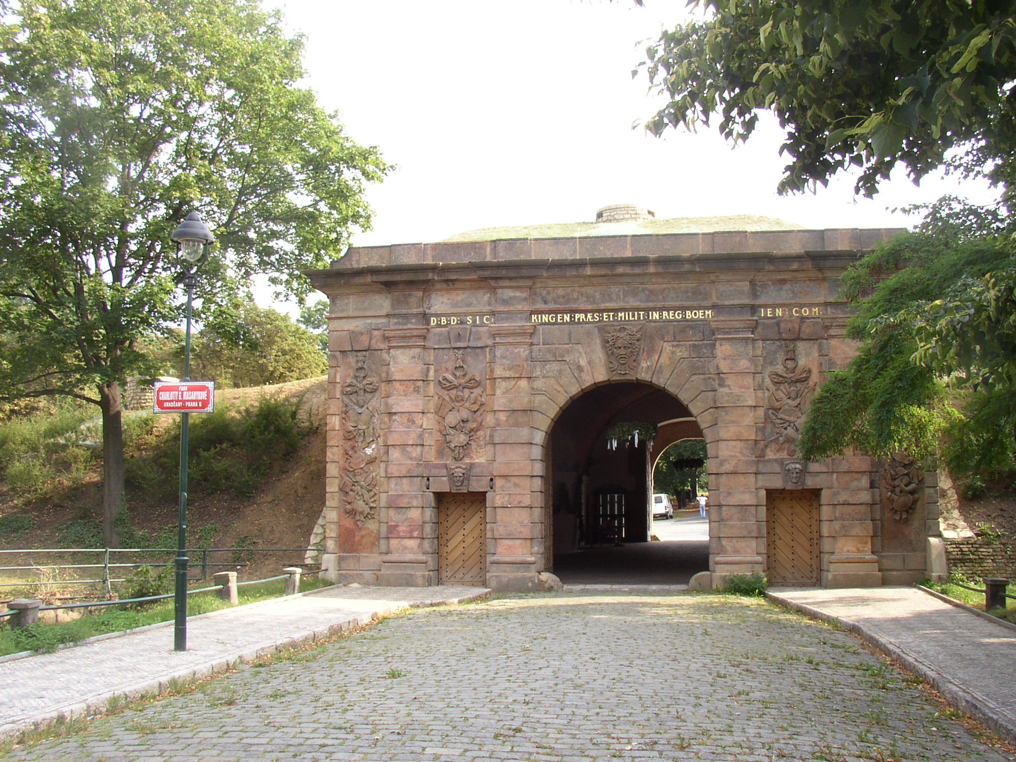 Písecká brána v Praze. Pohled z vnitřní strany.